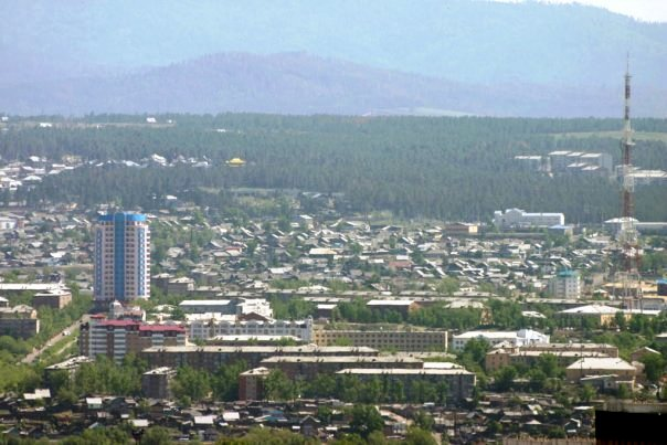 Октябрьский район